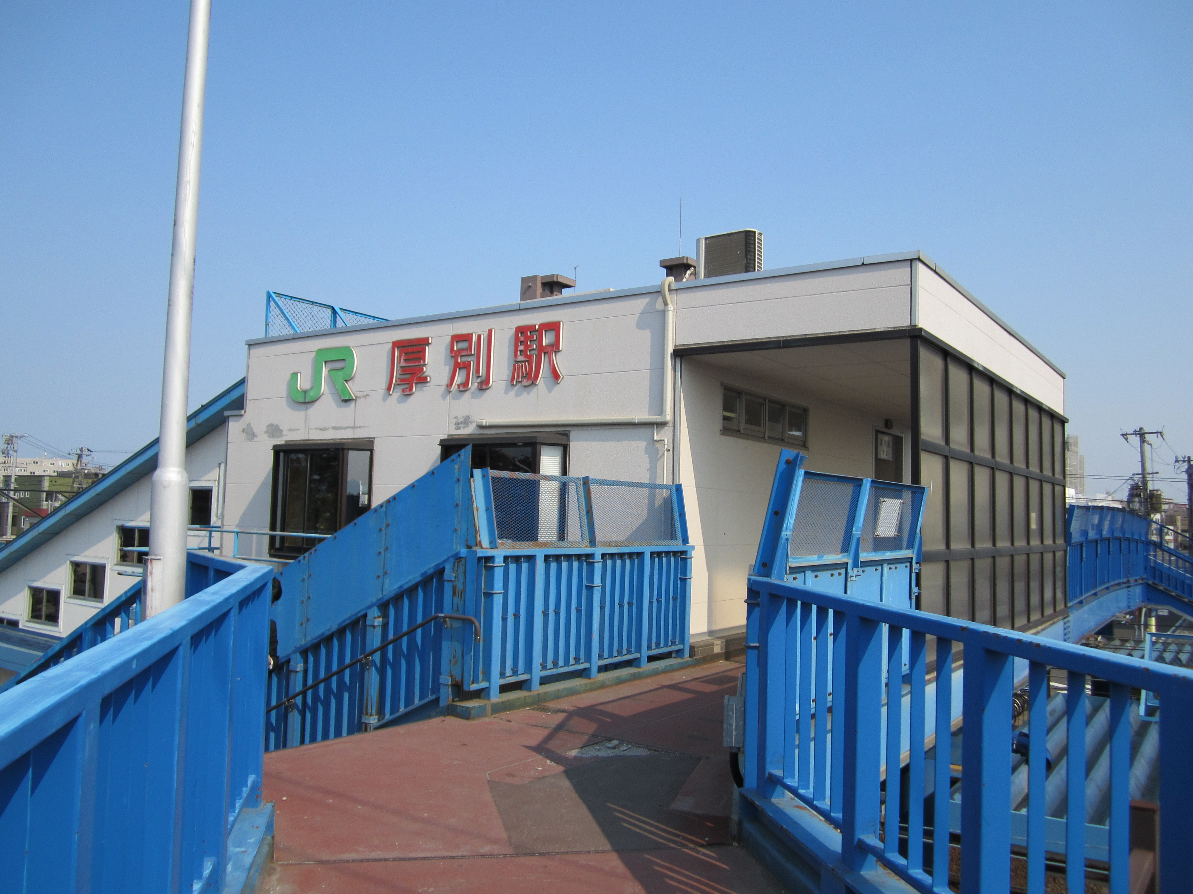 北海道旅客鉄道函館本線厚別駅西口駅舎